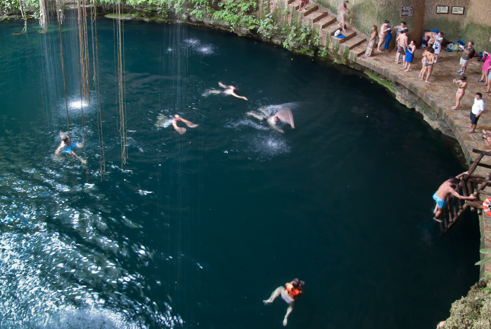 Cenote próximo a Chichén Itzá, México